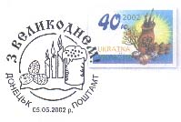 Пасхальное спецгашение и оригинальная марка Украины (деталь художественного маркированного конверта, 2002).